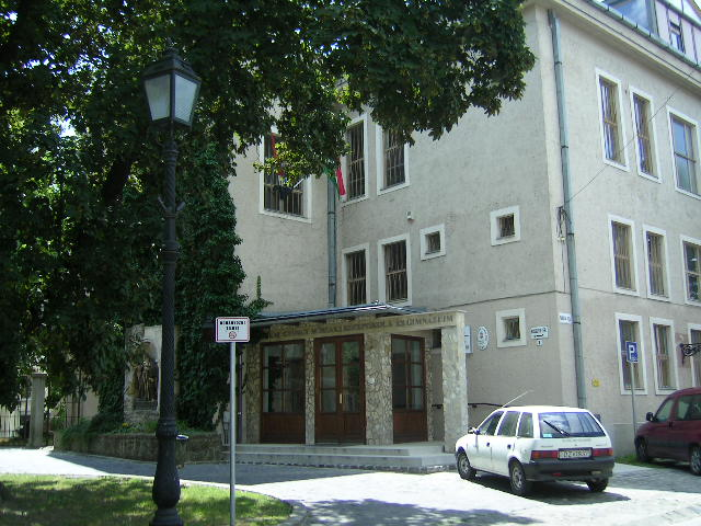 Boronkay György Középiskola tanüzeme, Vác (Piarista u.)